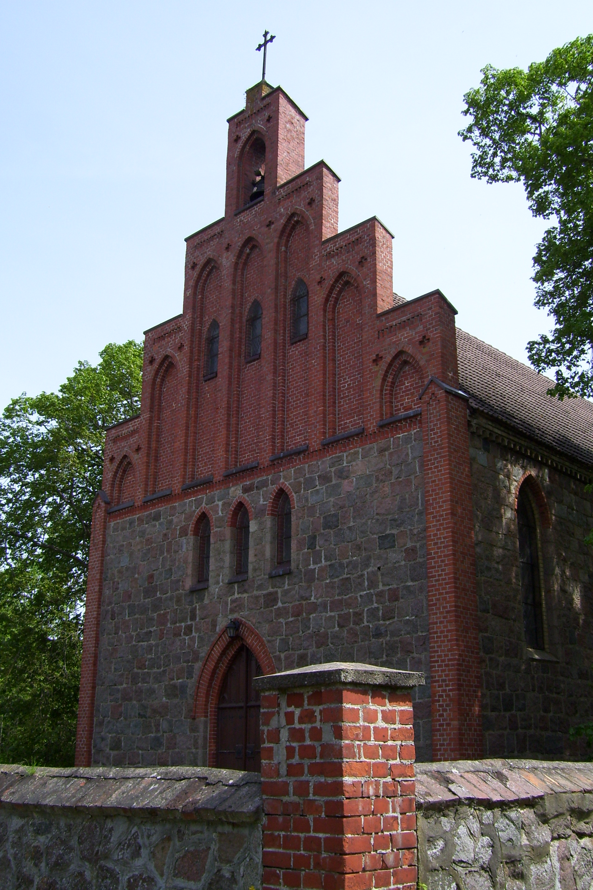 Kirche in Kölzin, Landkreis Ostvorpommern, Westgiebel